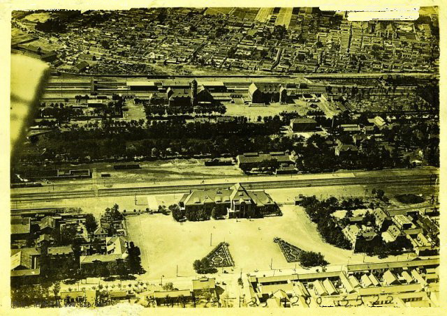 济南火车站。上部为津浦铁路济南站，下为胶济铁路济南站